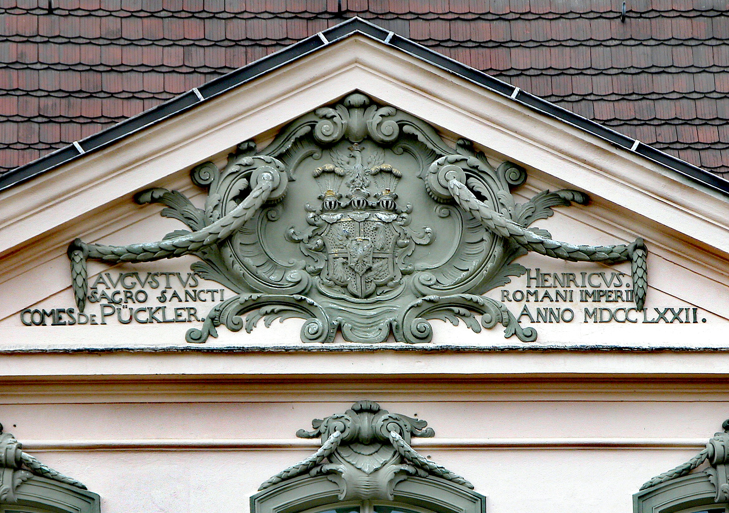 13.05.2015 03042 Branitz (zu Cottbus): Fürst-Pückler-Park Branitz Schloß von Osten. [DSCN5616.JPG]20150513320DR.JPG(c)Blobelt